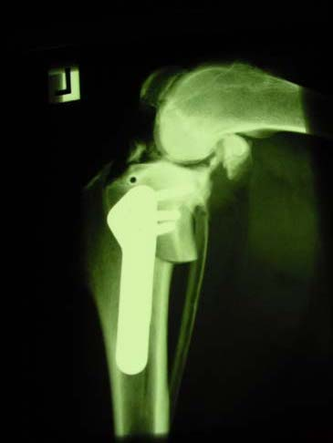 tplo knee x ray